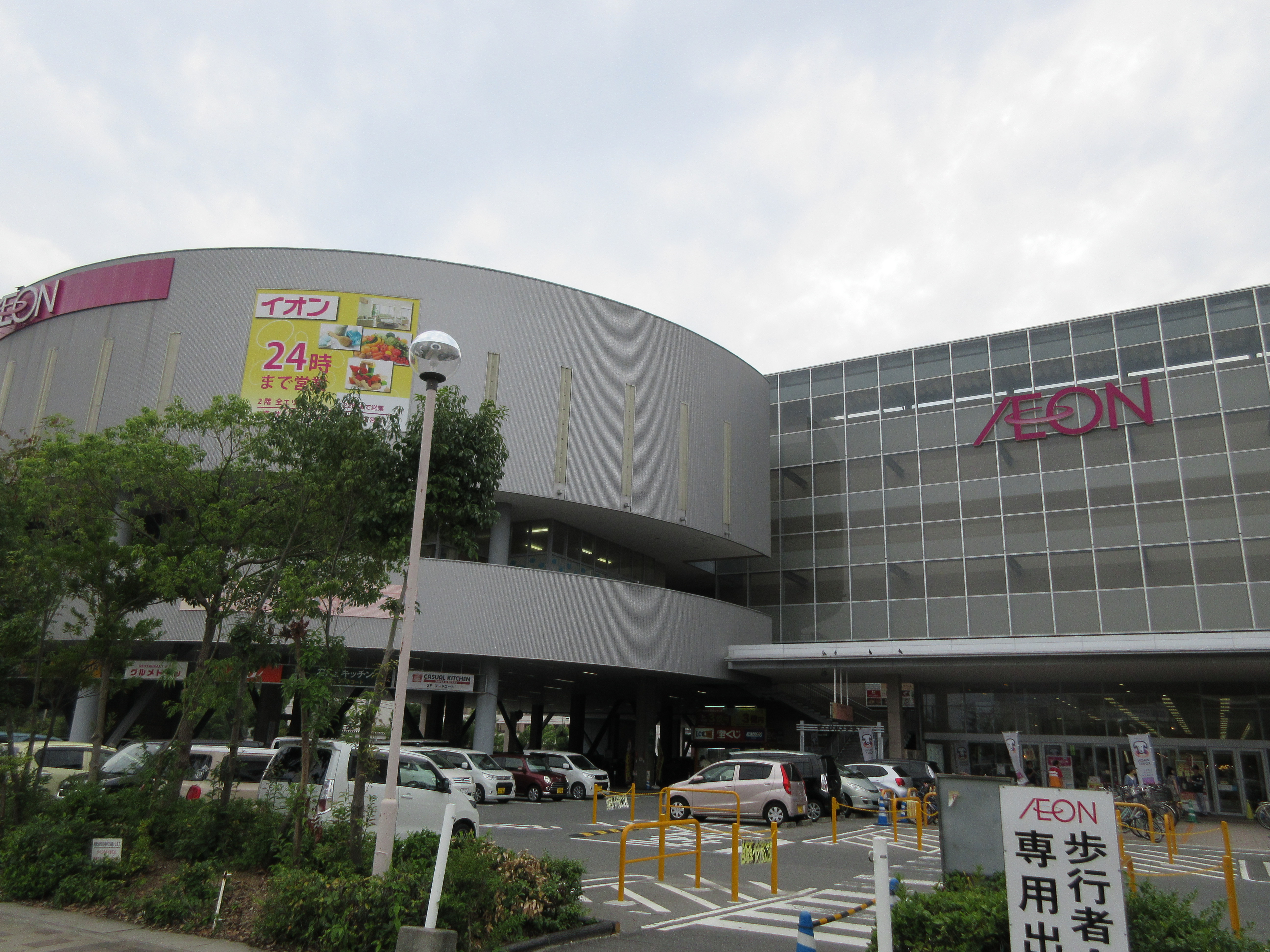 核テナントがジャスコからイオンへ変わりました。